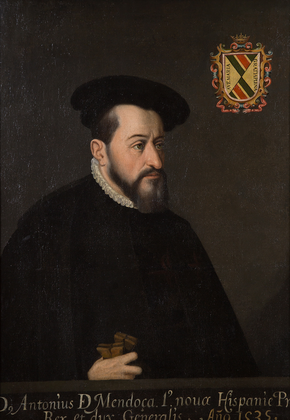 Viceroy Antonio de Mendozalabel QS:Len,"Viceroy Antonio de Mendoza"label QS:Les,"Virrey Antonio de Mendoza"